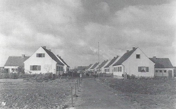 Fotografie der 1932–1936 errichteten Kleinsiedlung Am Rosengarten in Halle (Saale).